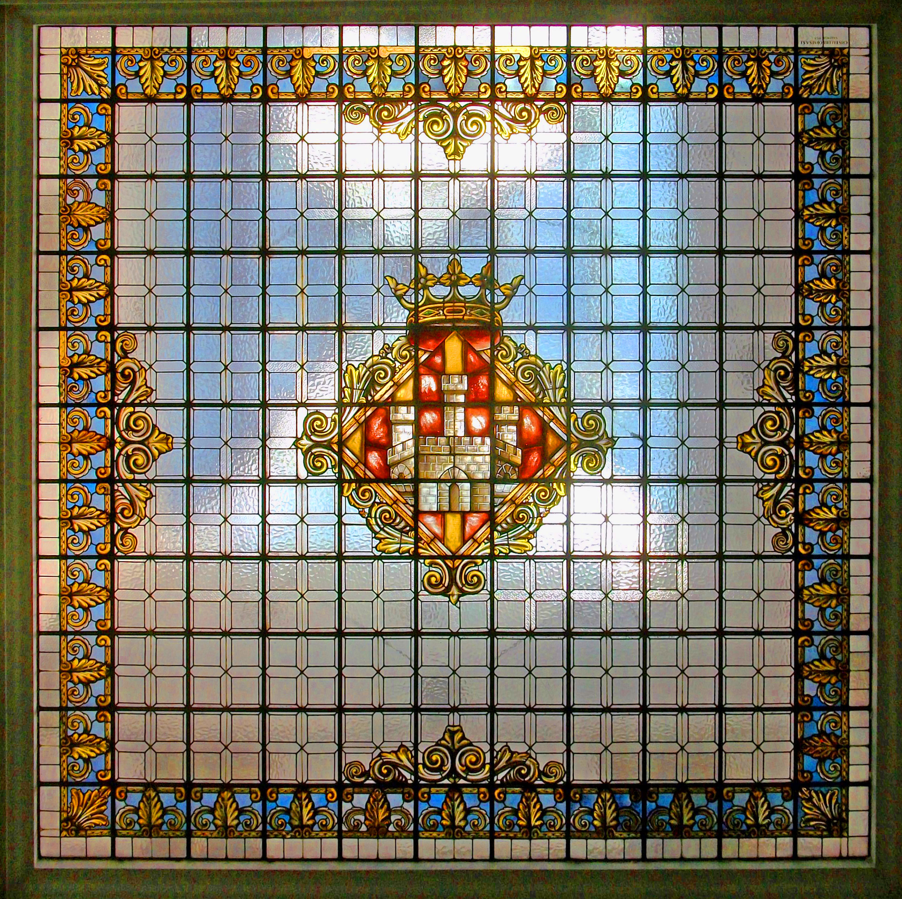 Vitrall a l'ajuntament de Castelló de la Plana amb l'escut de la ciutat.